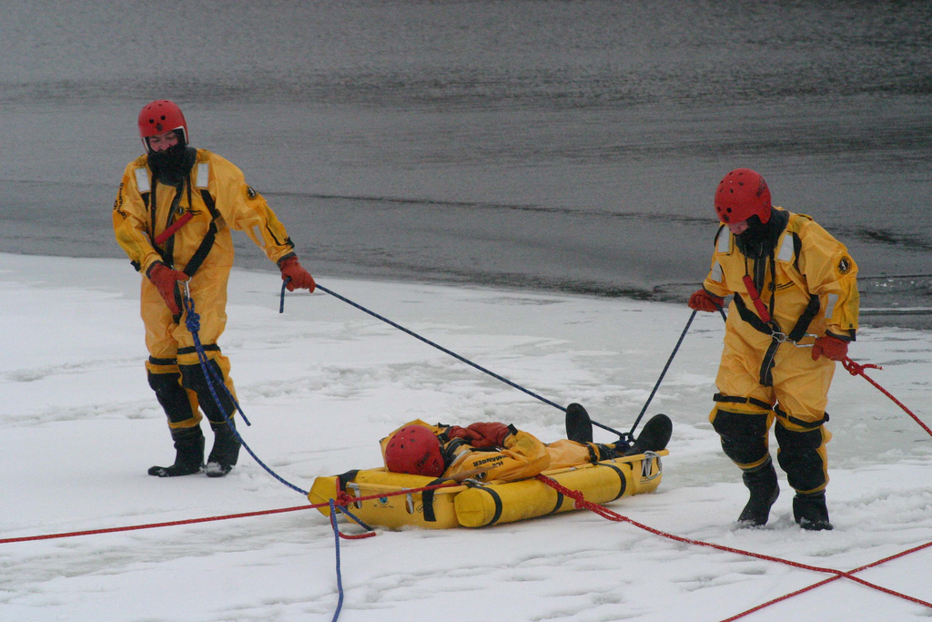 Ice Rescue Training